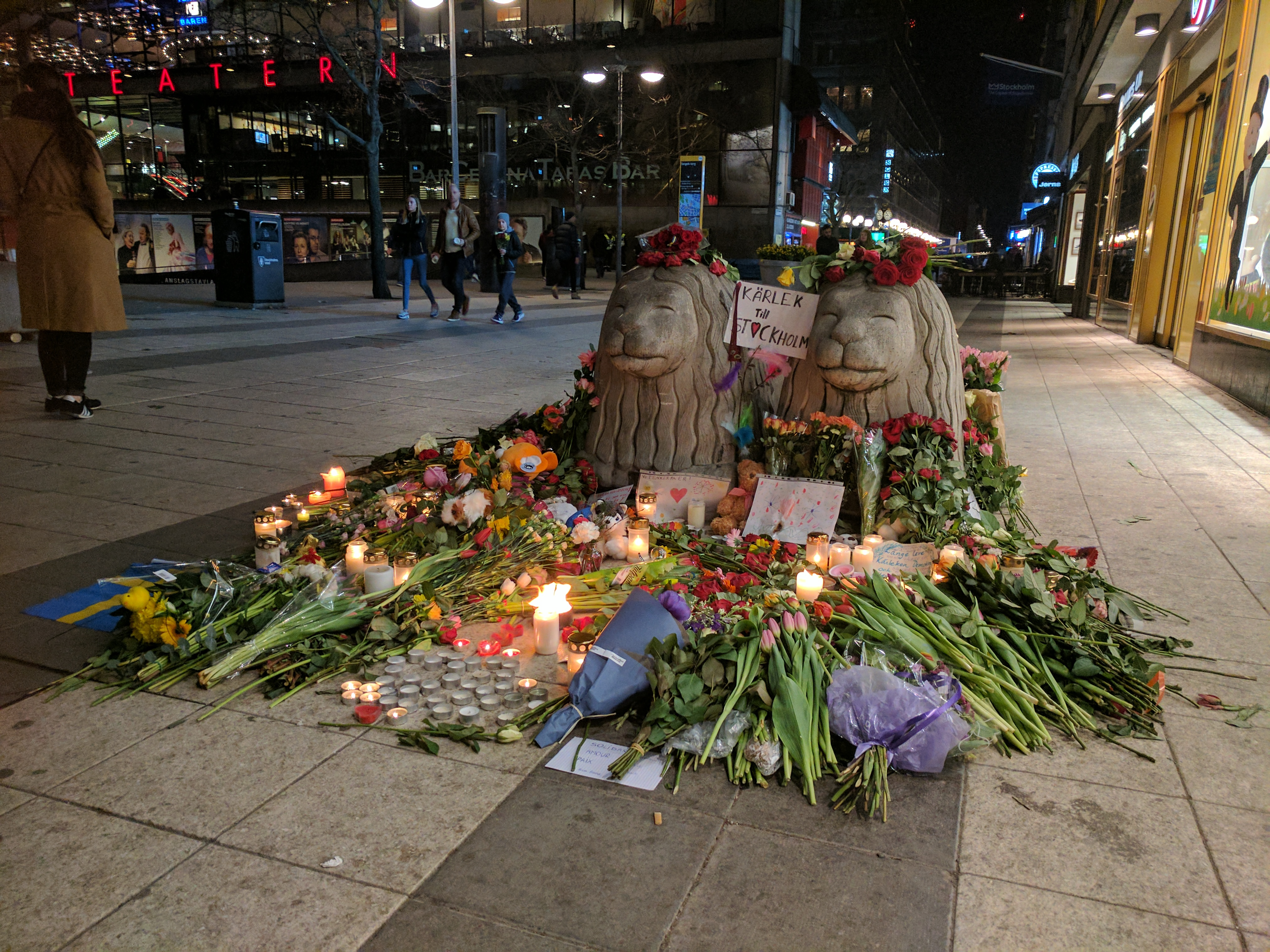 2017 Stockholm attack - 2017-04-08